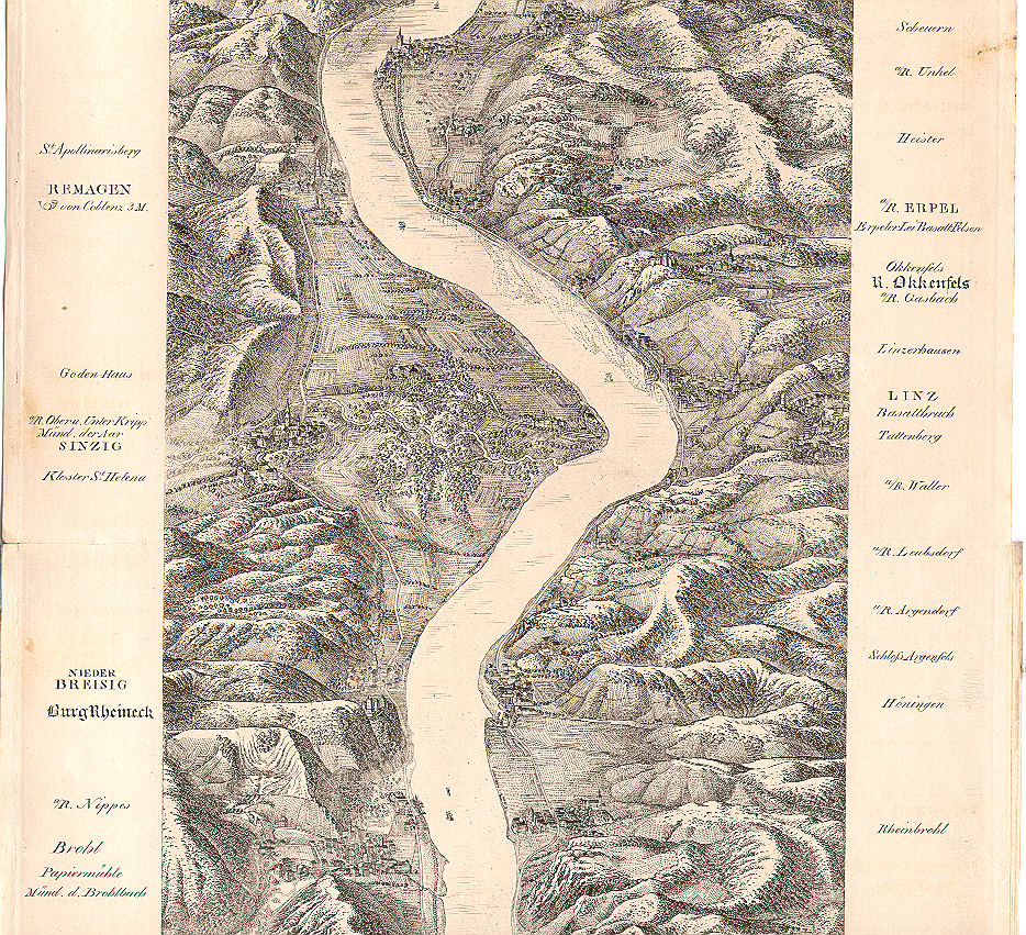 Rheinpanorama bei Sinzig